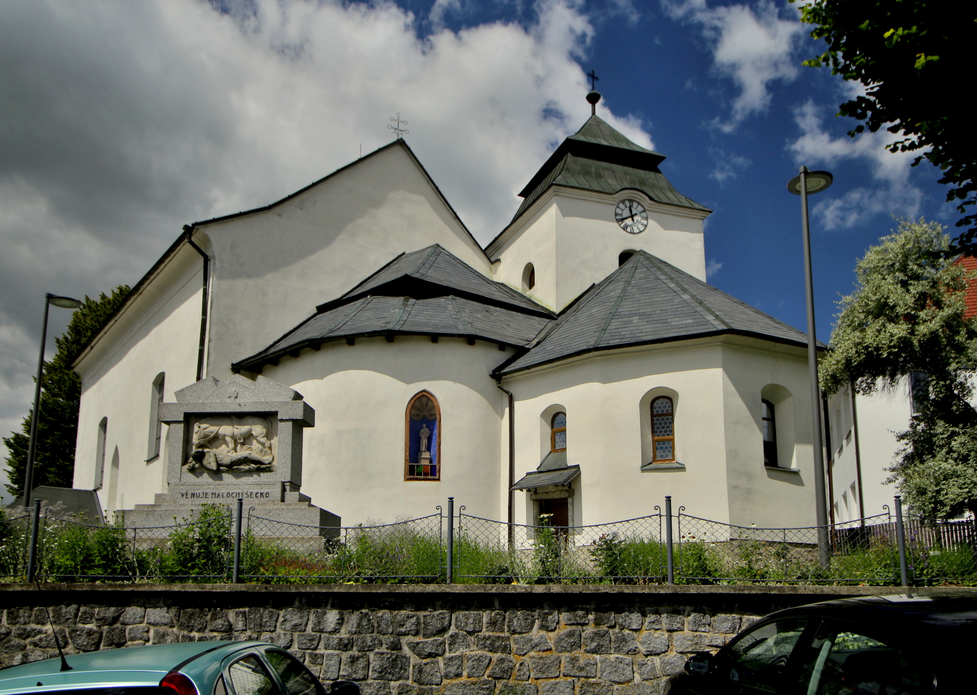 Kostel sv. Prokopa v Chyškách